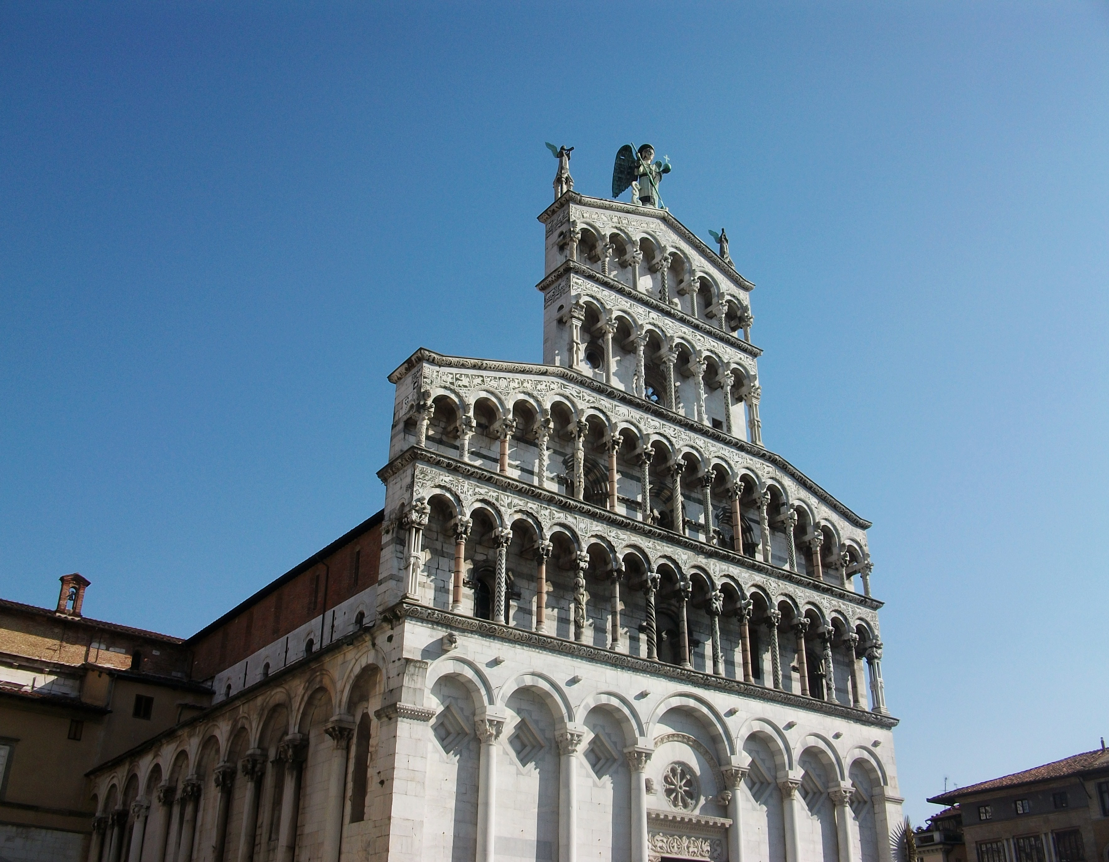 Església de San Michele in Foro (Lucca).